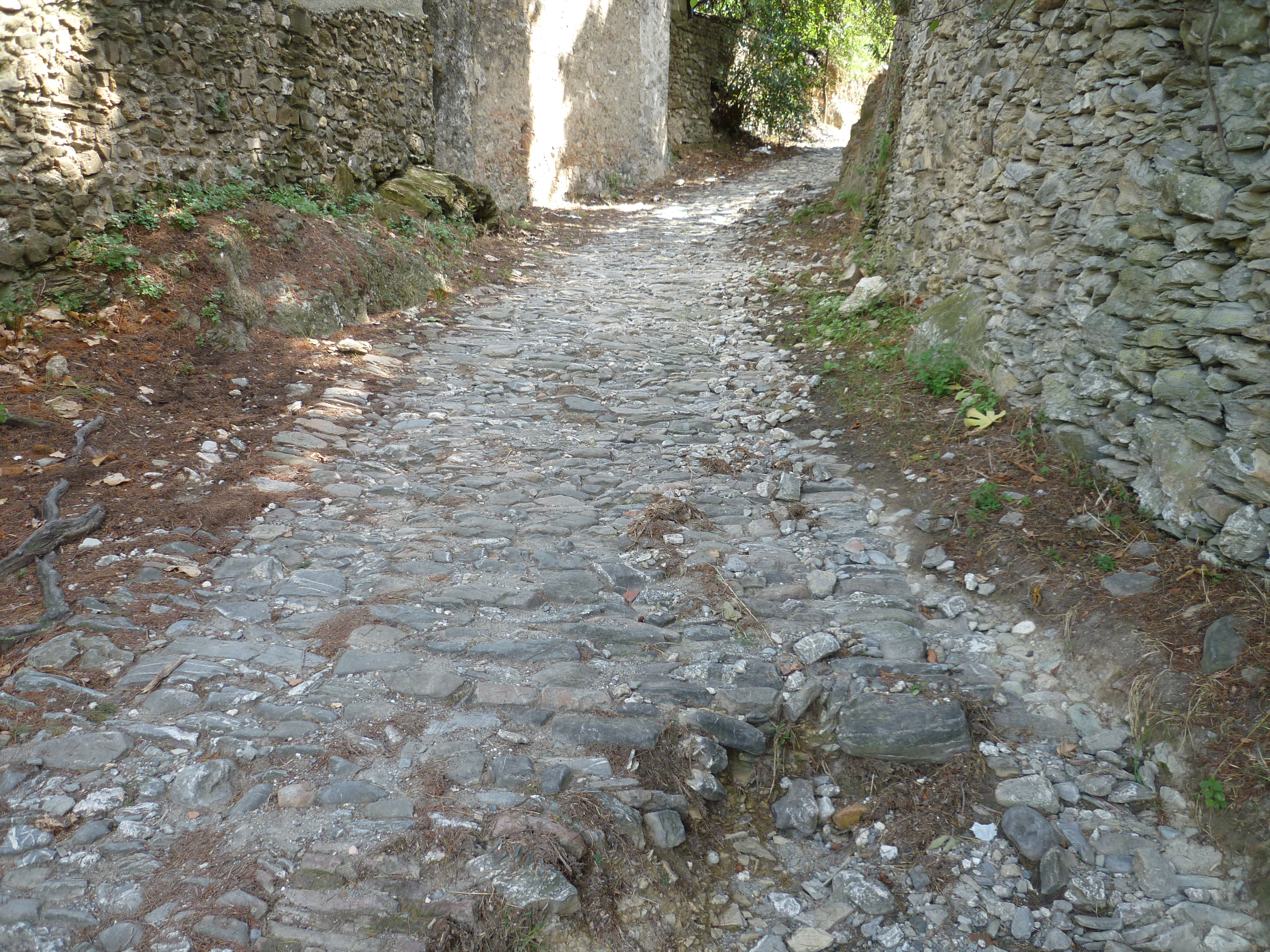 Tronçon, à la sortie de « Albingaunum », cité romaine d Albenga (Ligurie, Italie), de la voie romaine « Via Julia Augusta ».